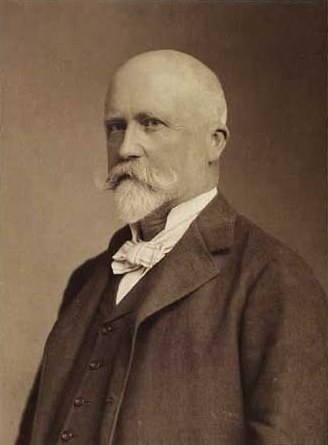 Bernhard Ulrik Middelboe (1850-1931), Danish painter and industrialist